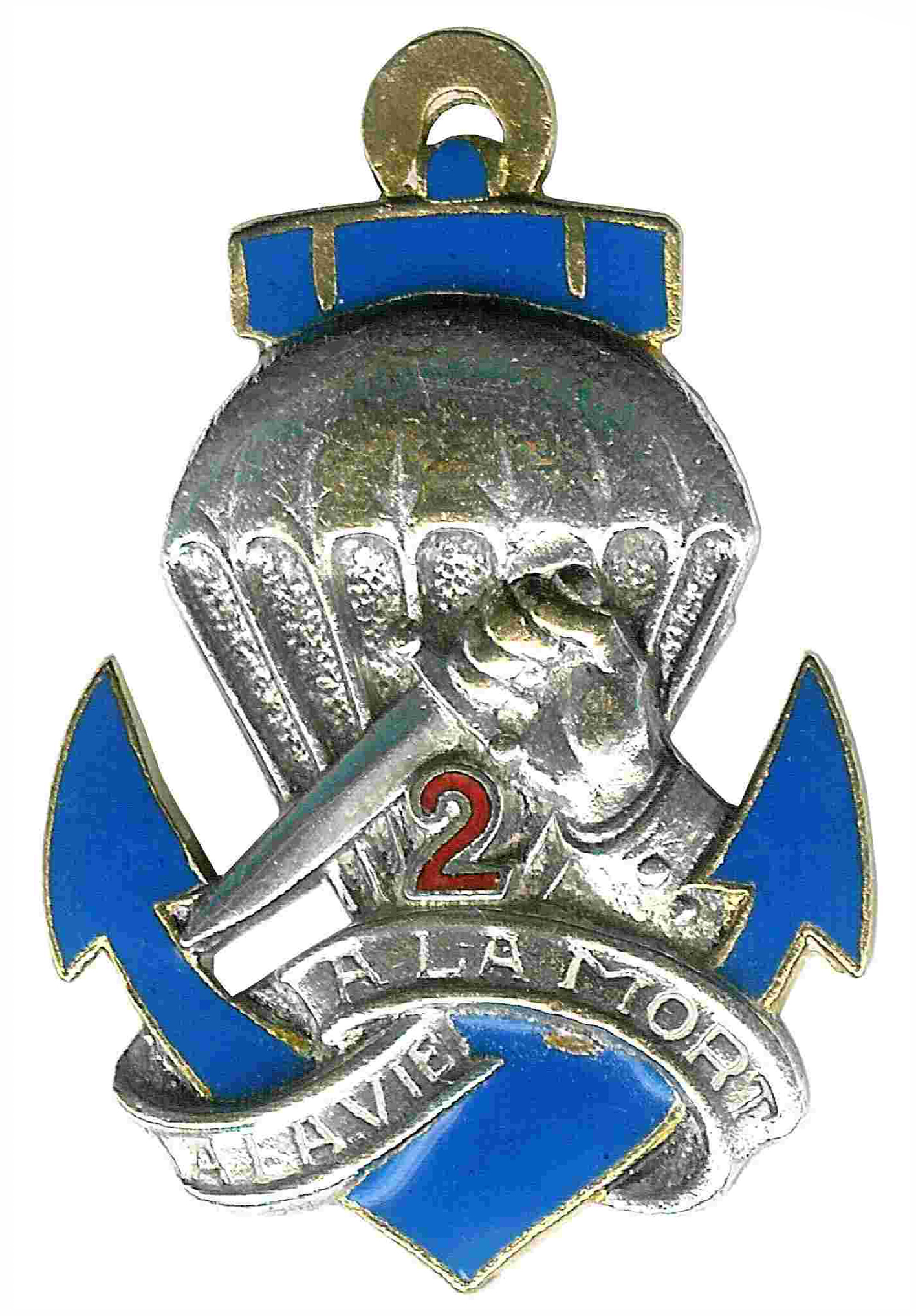 Insigne du 2° BCCP